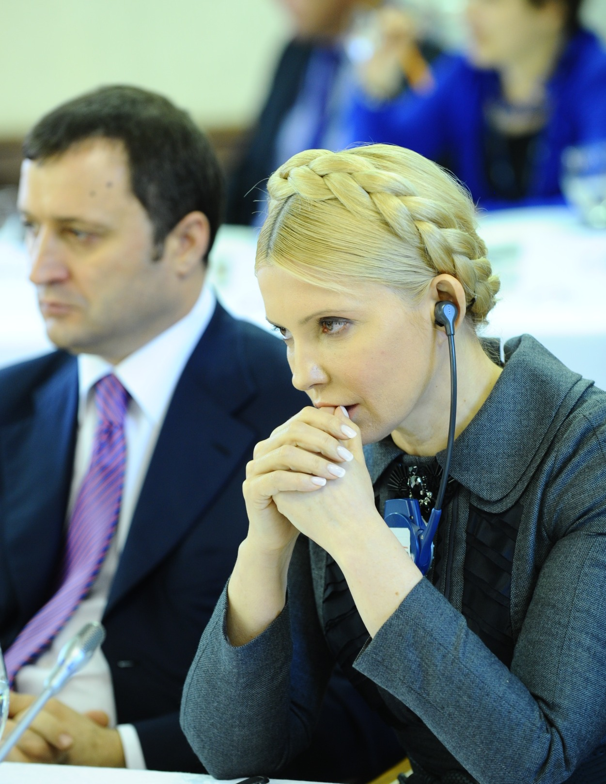 Yulia Tymoshenko